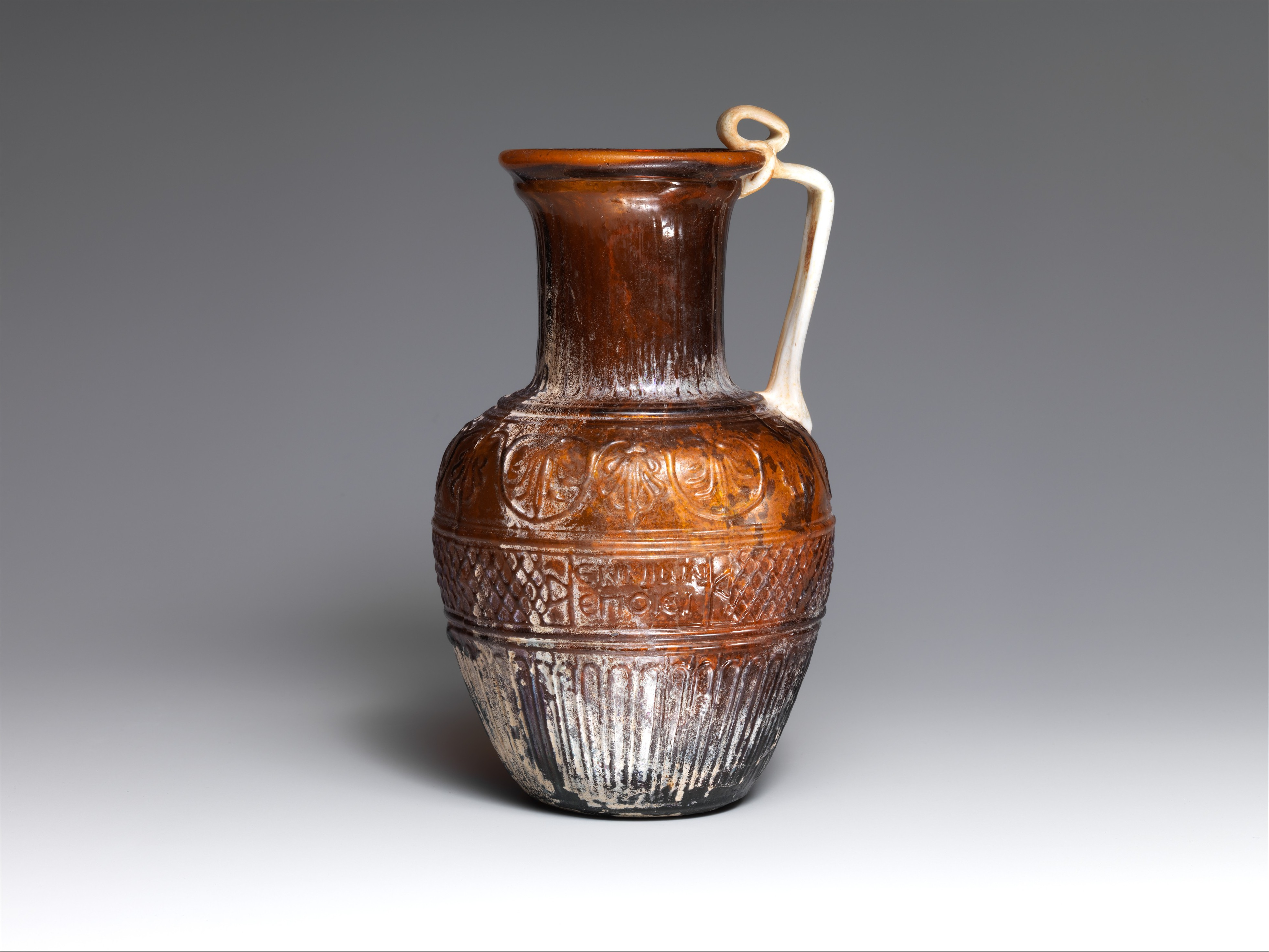 Roman; Ennion jug; Glass